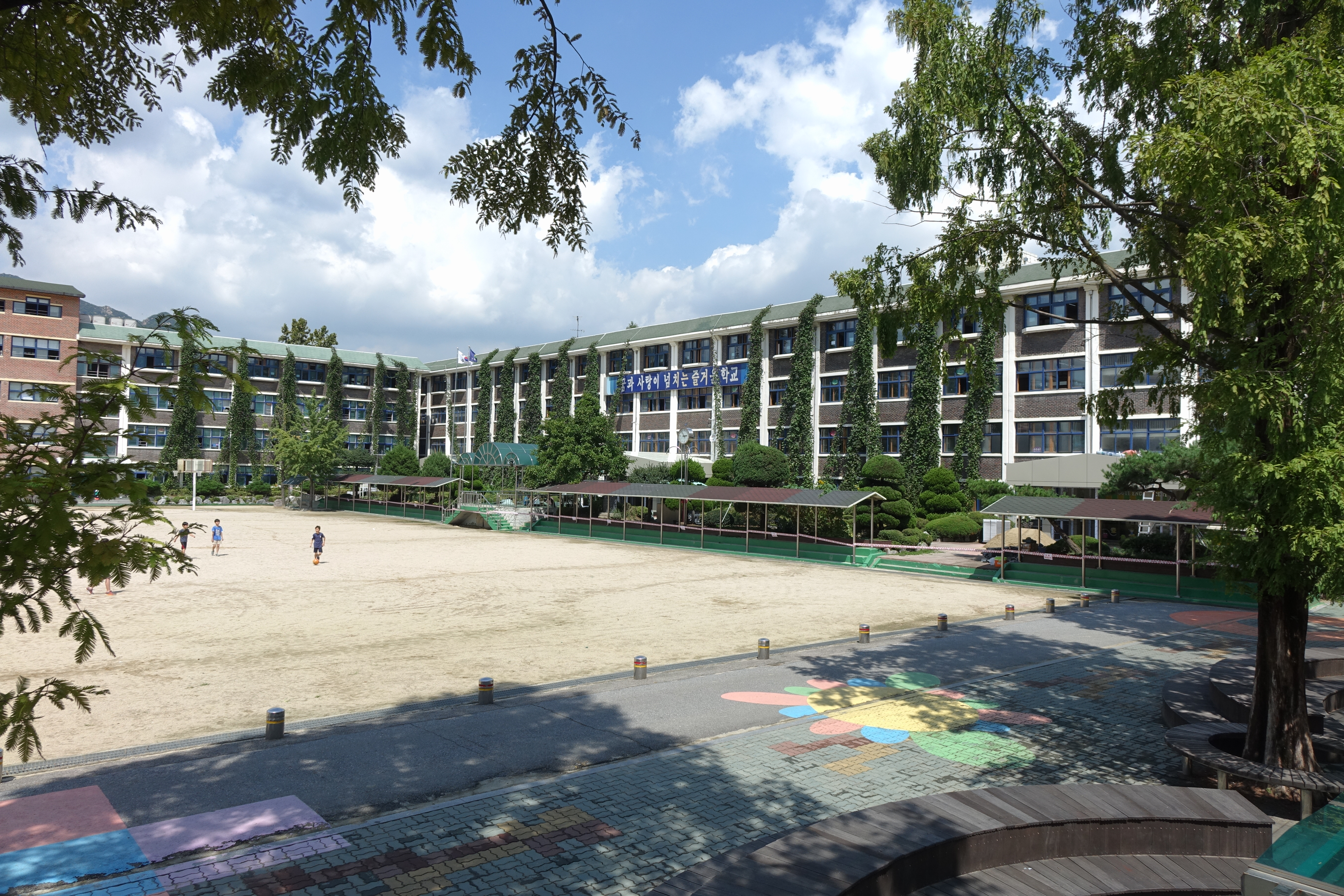 2014년 9월 경기도 과천시